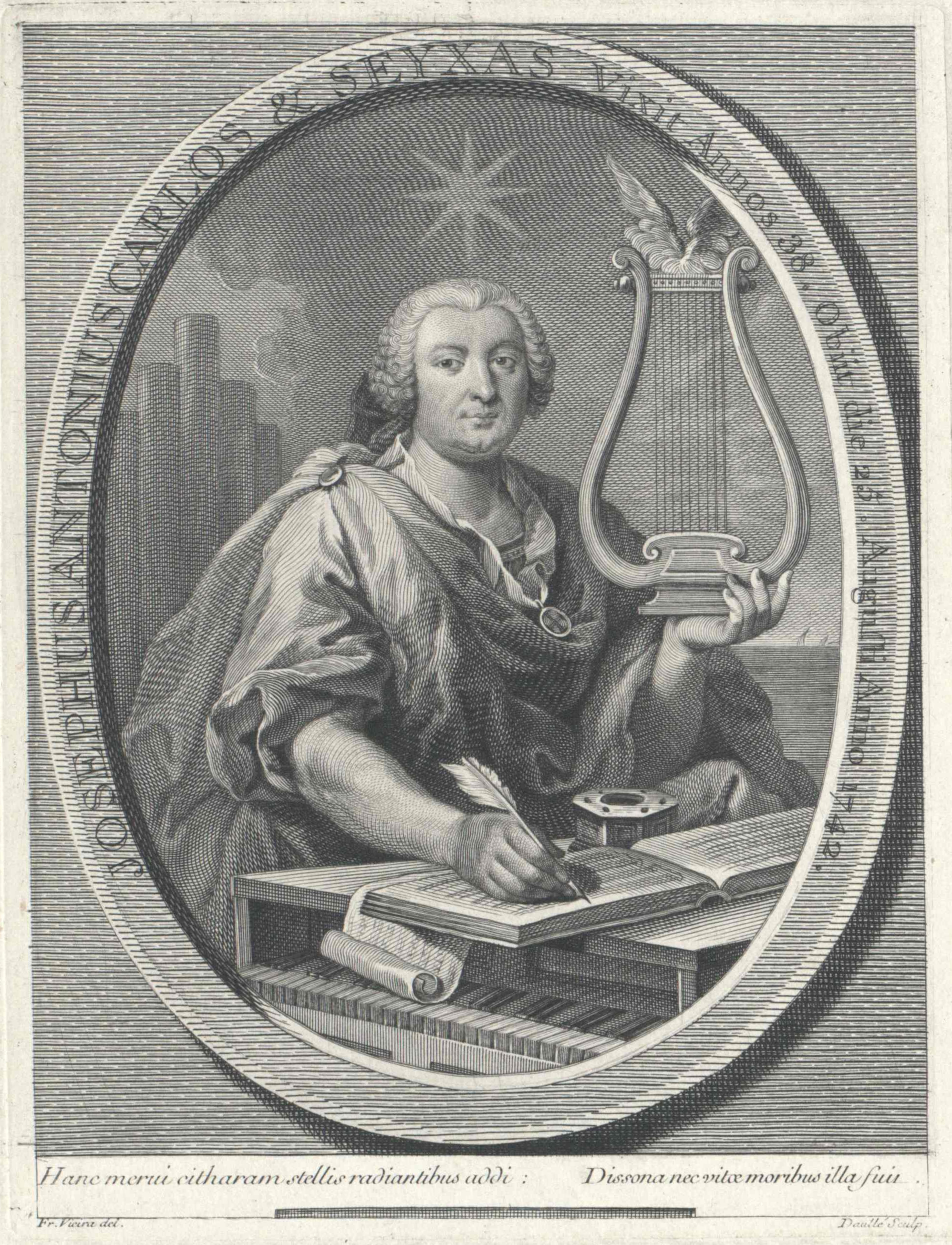 Retrato em gravura, póstumo, do compositor português Carlos Seixas, idealizado por Vieira Lusitano e executado por Jean Daulié.